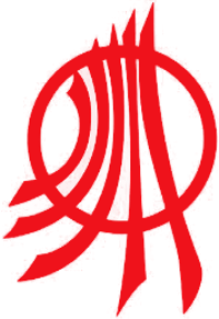 لوگوی جمعیت امداد دانشجویی امام علی